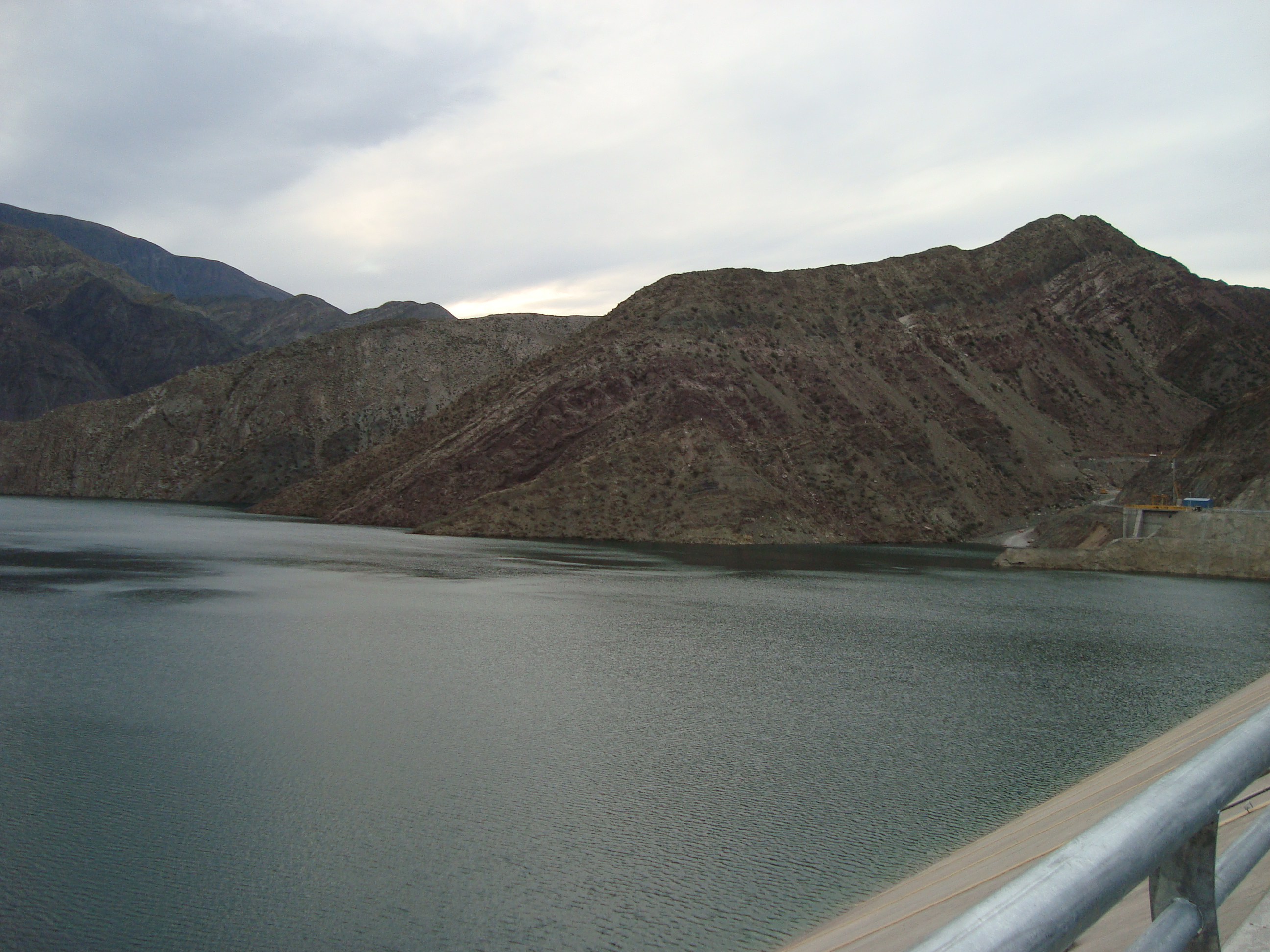 Vista del Embalse Caracoles, límite entre los departamento Ullum y Zonda, provincia de San Juan, Argentina